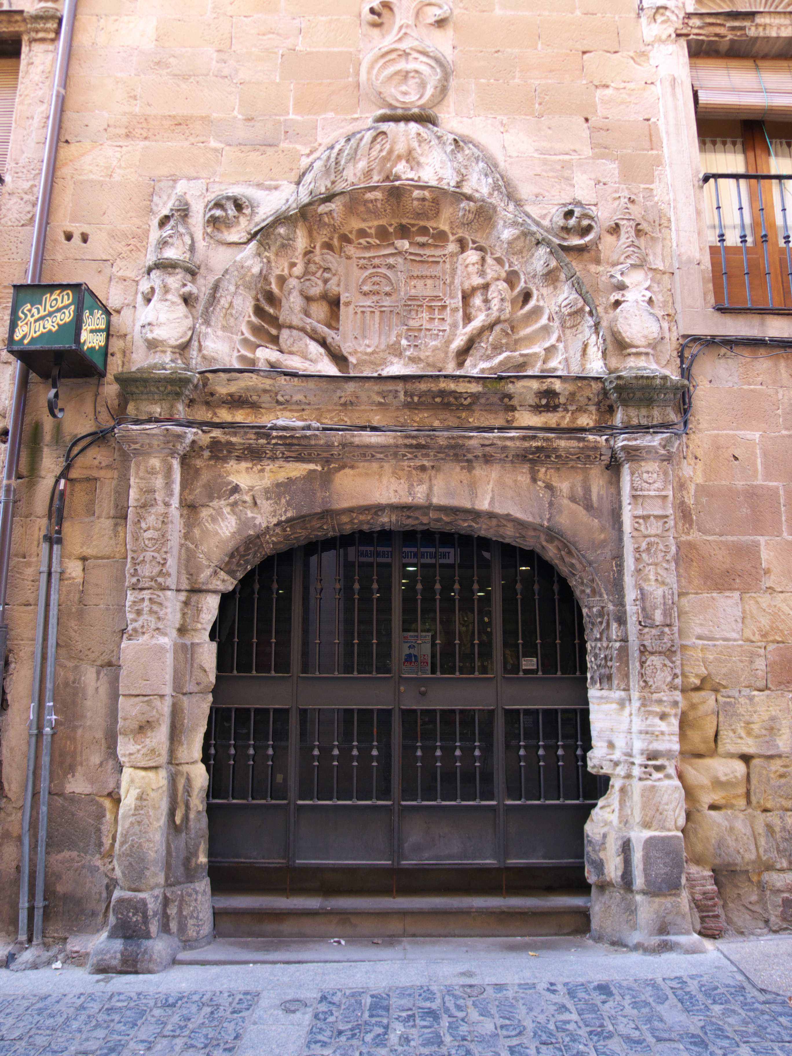 Interesante muestra del plateresco civil en Soria.